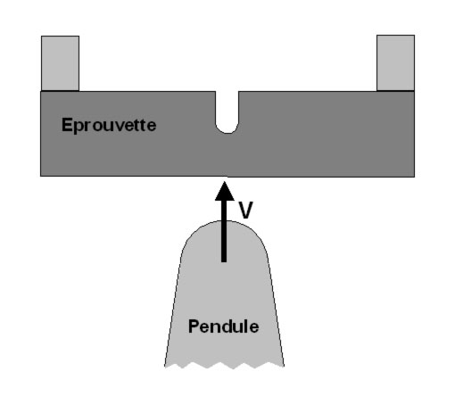 Eprouvette sollicitée en flexion 3-points dynamique Mesure de résilience Auteur : Taveneaux 2 février 2006 à 22:11 (CET)